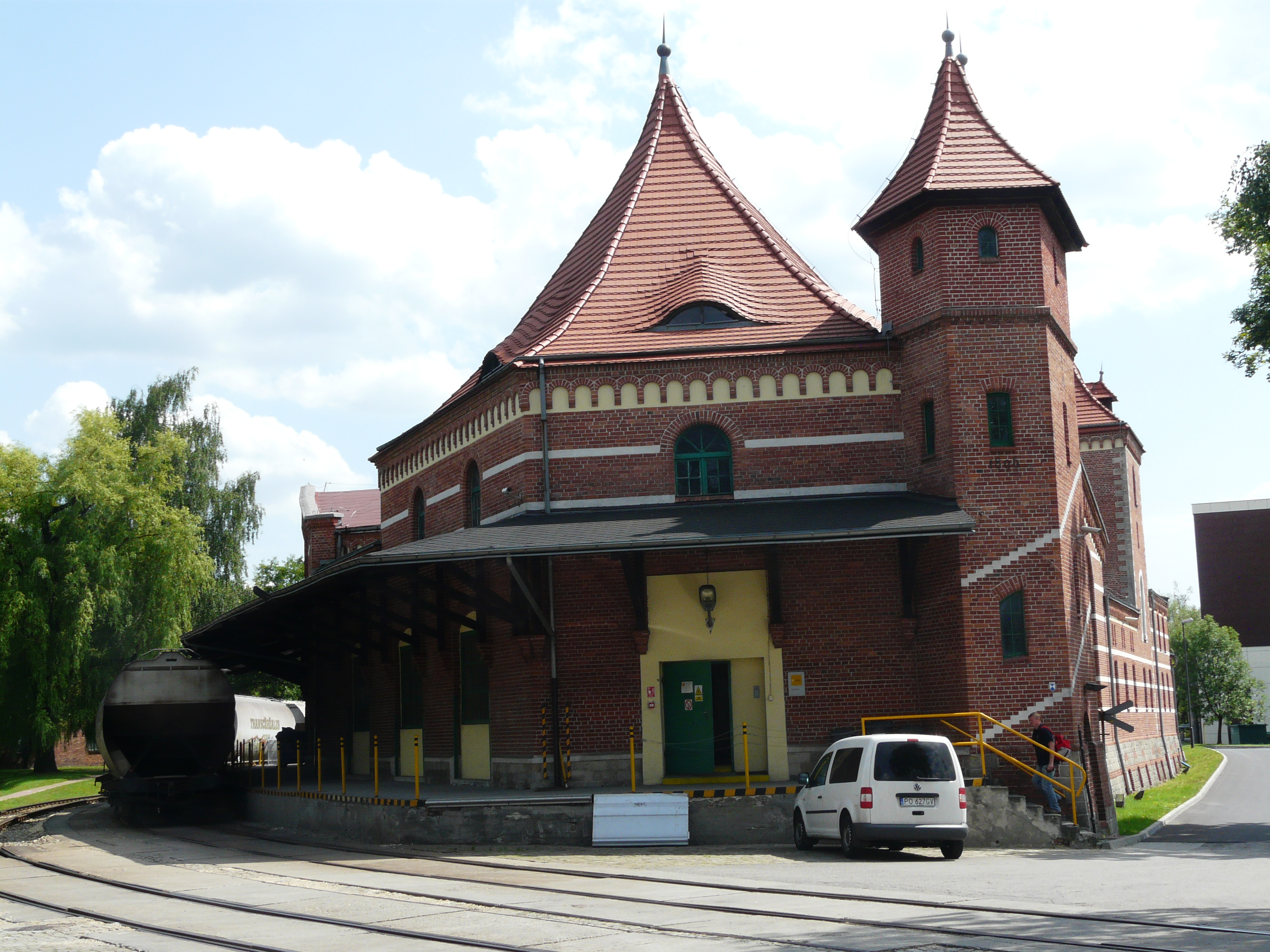 Browarium Tyskie